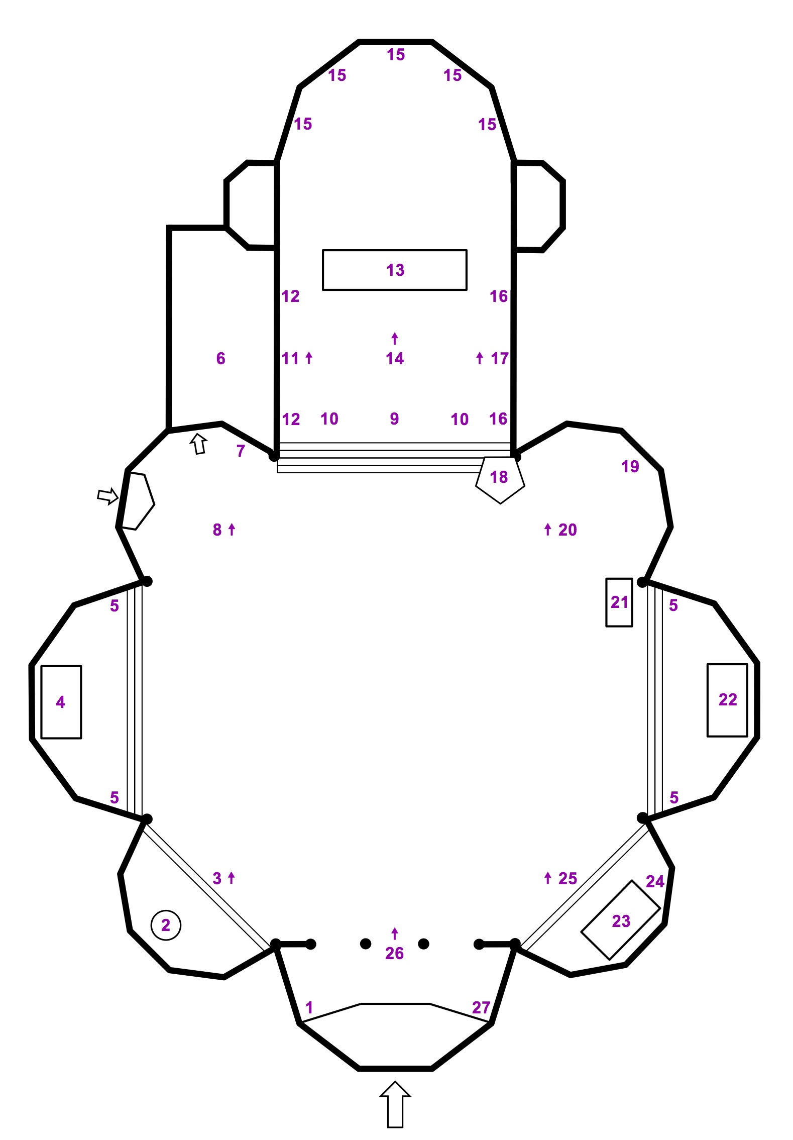 Piantina del duomo con numerazione degli arredi artistici